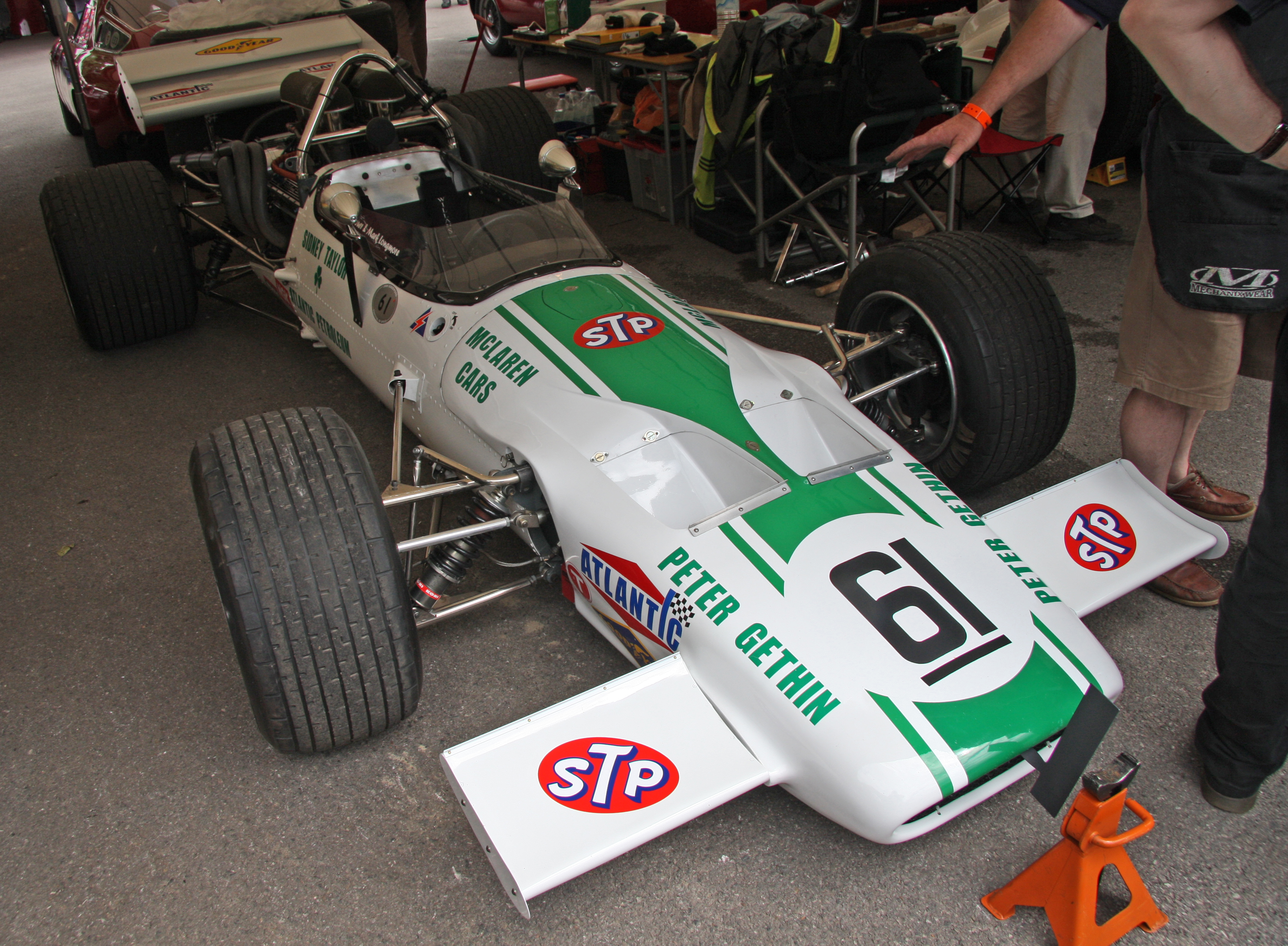 Built 1970. 5 litre V8